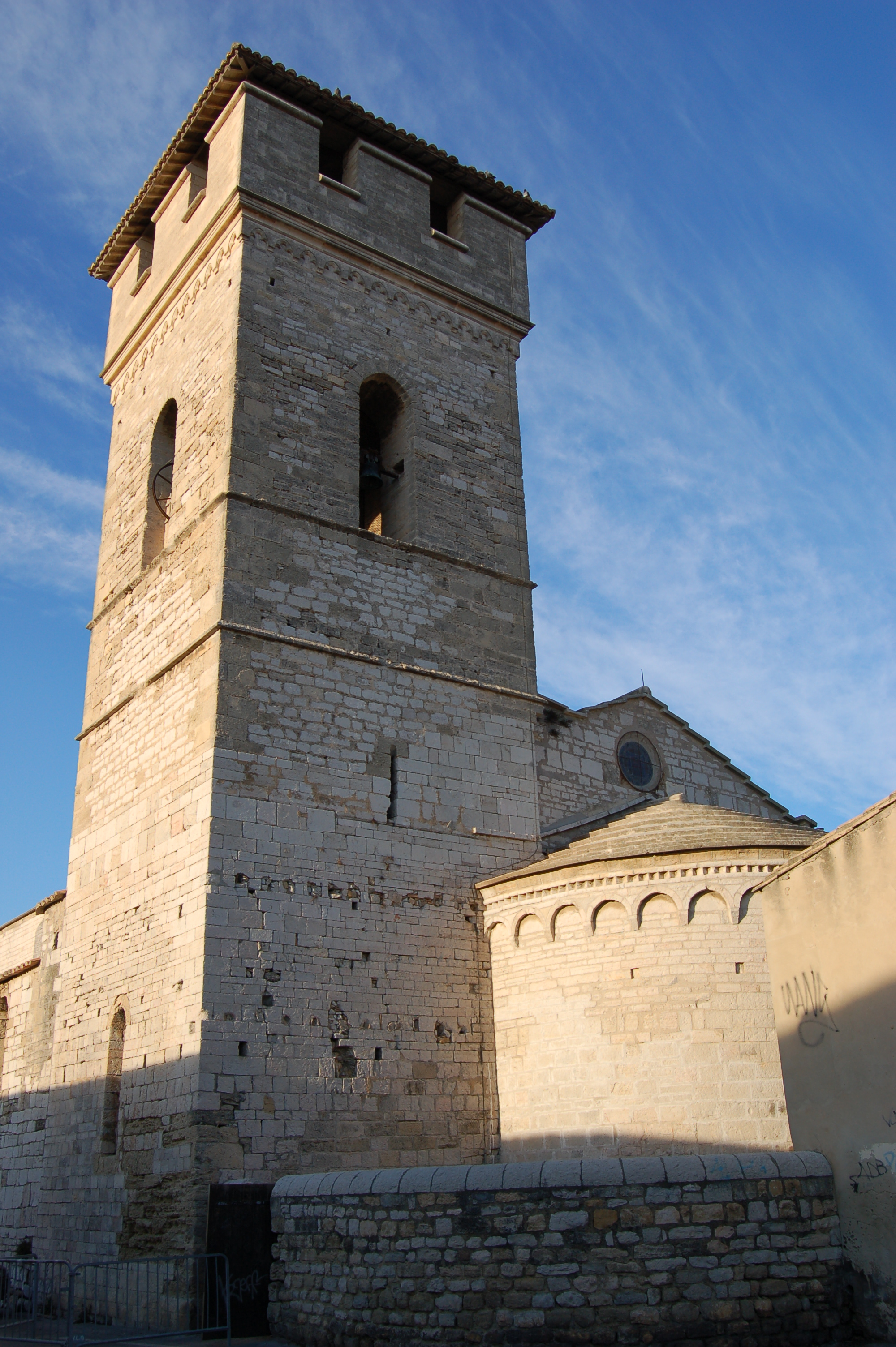 L'église est située dans le département français de l'Hérault, sur la commune de Villeneuve-lès-Maguelone. L'édifice est classé au titre des monuments historiques en 1840